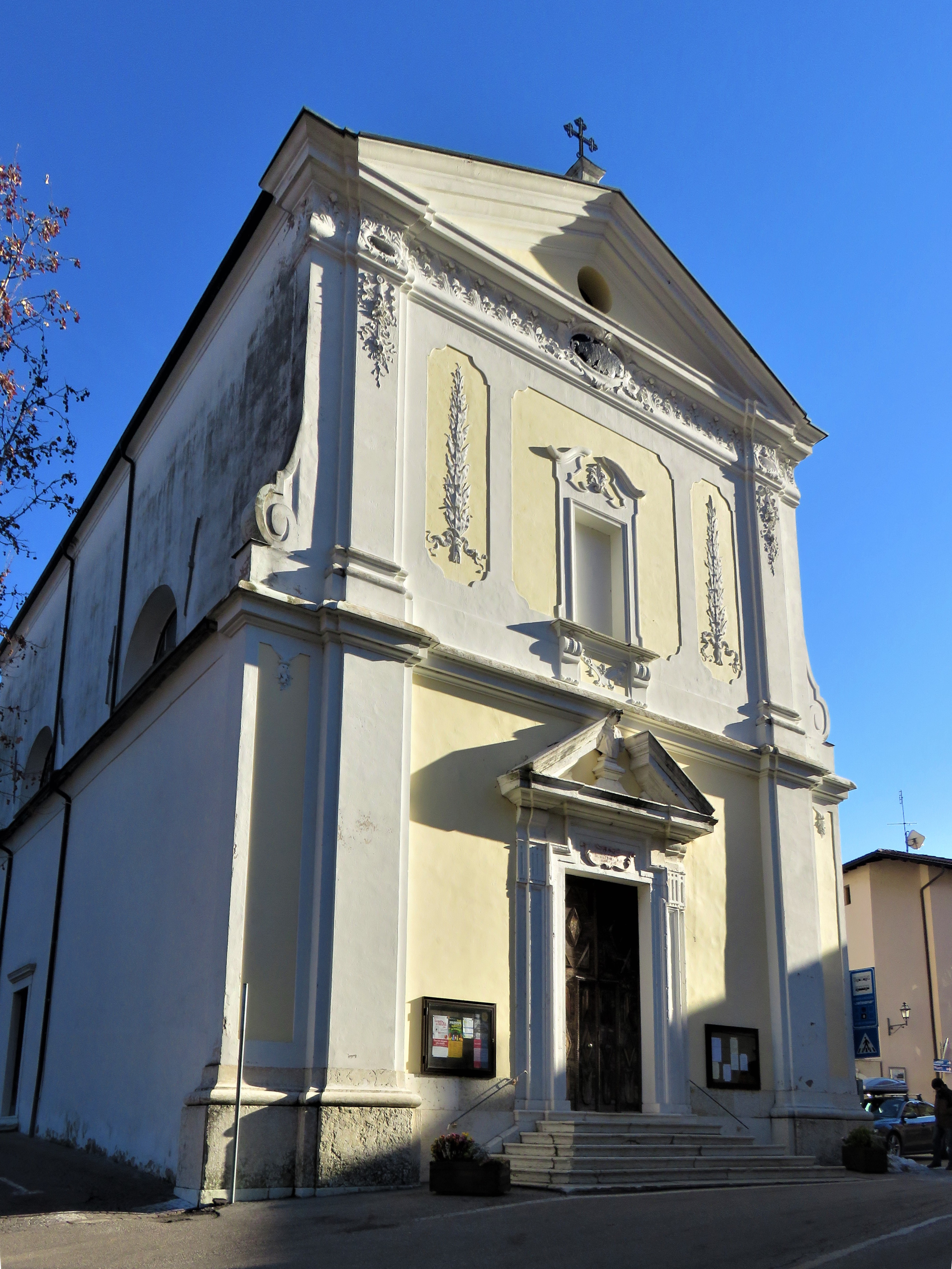 Prospetto principale